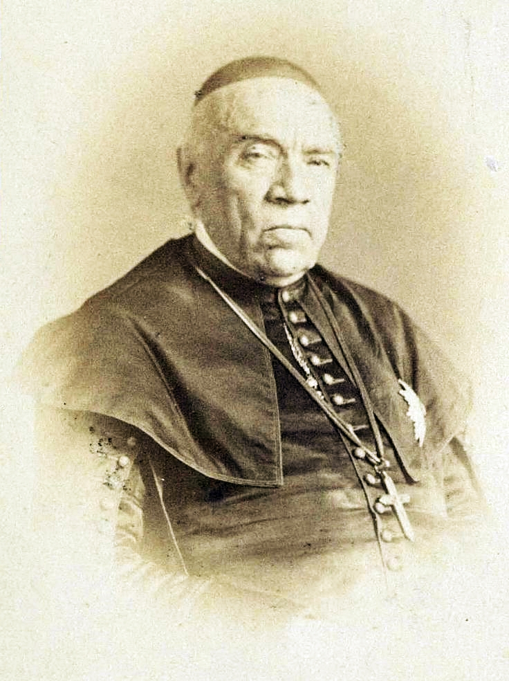 Scitovszky János bíboros